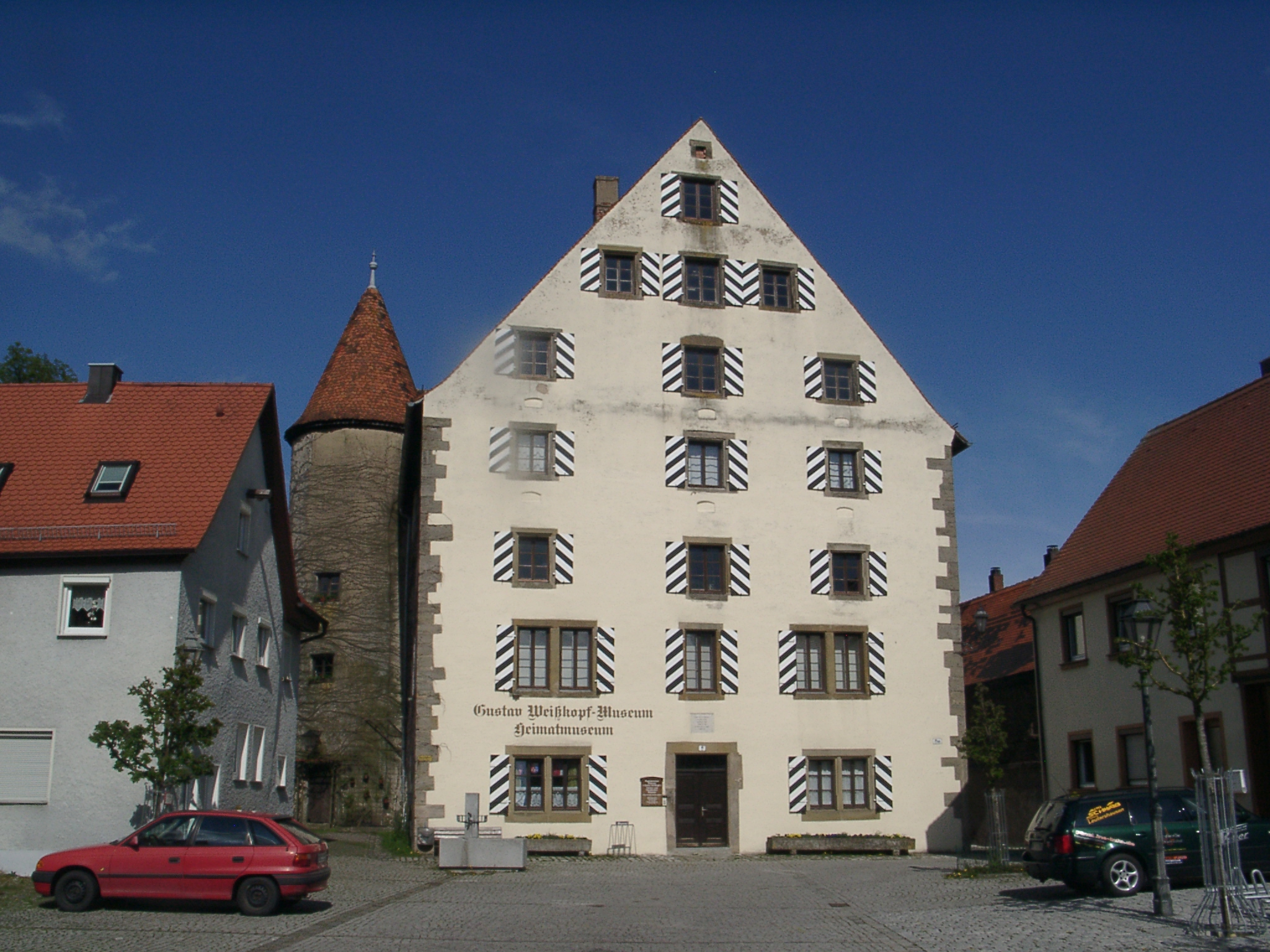 Leutershausen, Gustav-Weißkopf-Museum